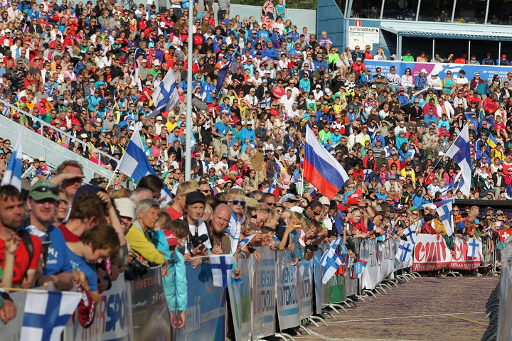 Sprint final 2013, WOC 2013, 35